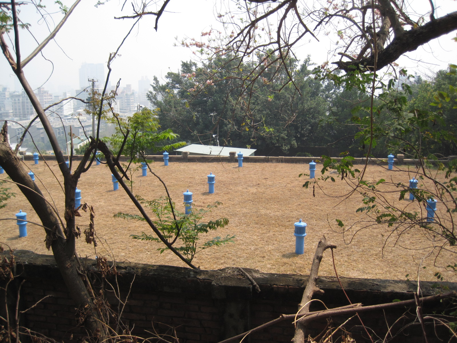 高雄鼓山區的打狗水道淨水池